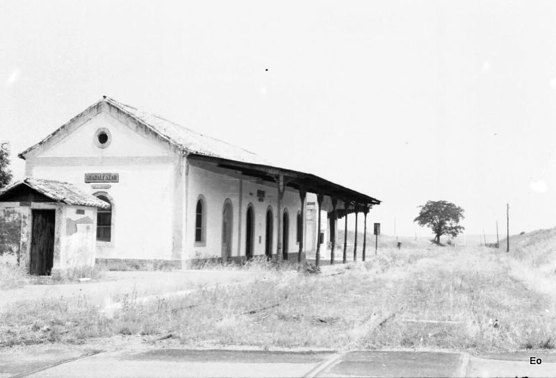 Estación de Guadalcazar